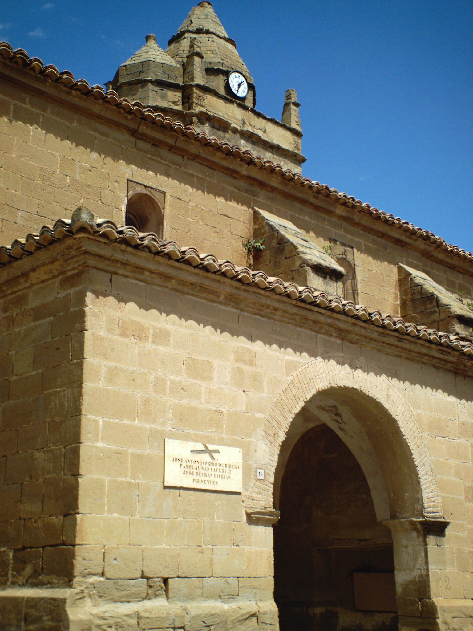 Torre-campanario de la Iglesia parroquial de Ibieca (Huesca) Aragonés: Torre-campanario d'a ilesia d'Ibieca (Uesca)